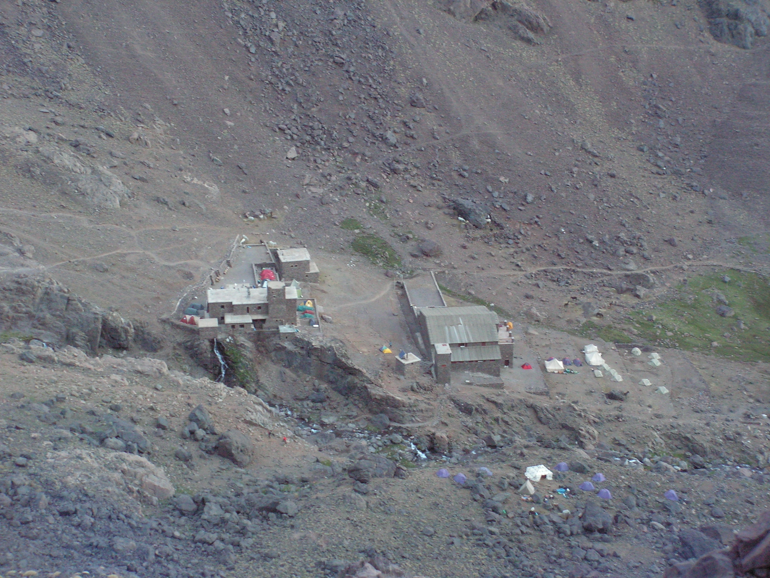 refuges au pied de l'Ikhibi sud